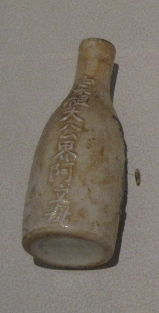 阿立祖祭祀瓶，攝於國立臺灣歷史博物館。